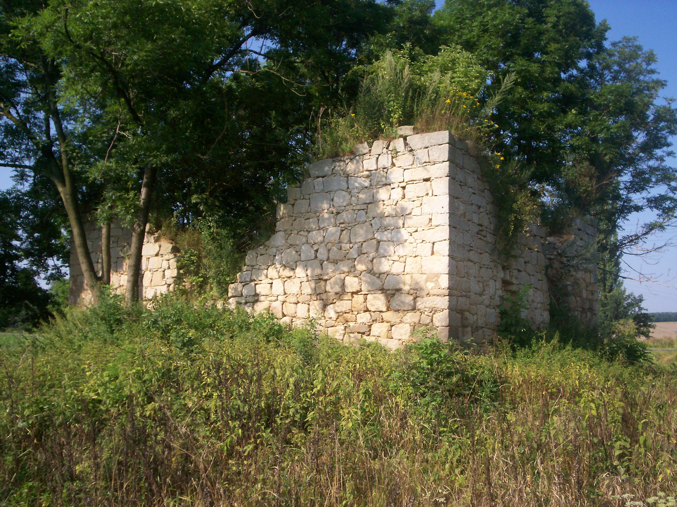 Rakowice Wielkie – wieża mieszkalna, pozostałość po folwarku książęcym.